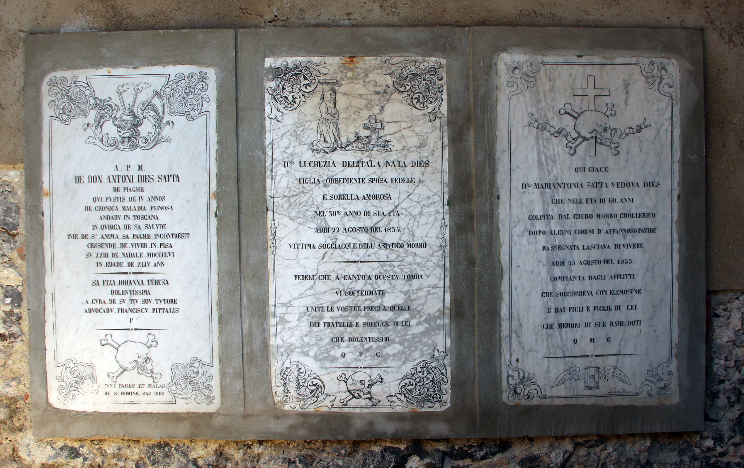 Ploaghe, SS